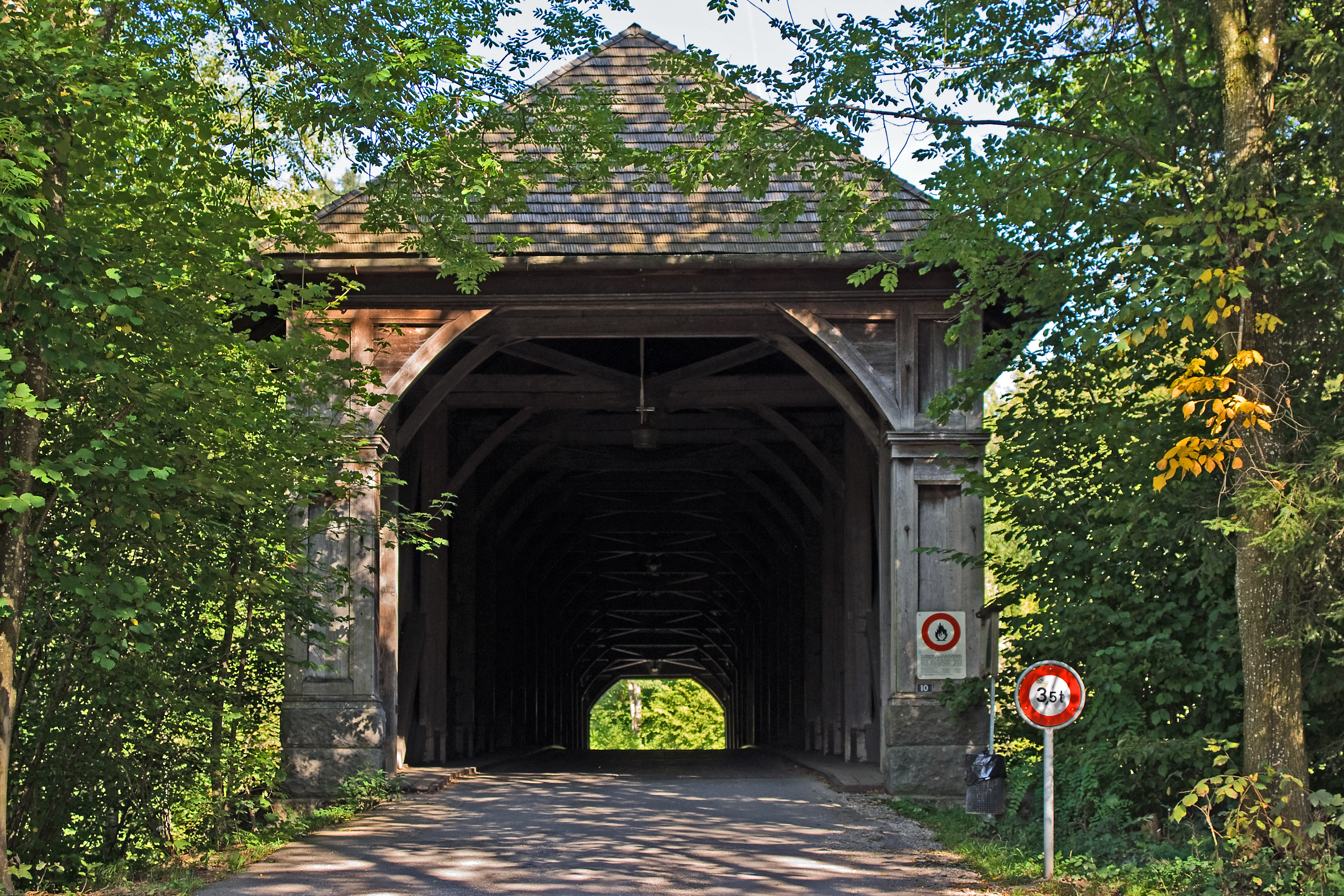 Hasle bei Burgdorf, alte gedeckte Holzbrücke über die Emme